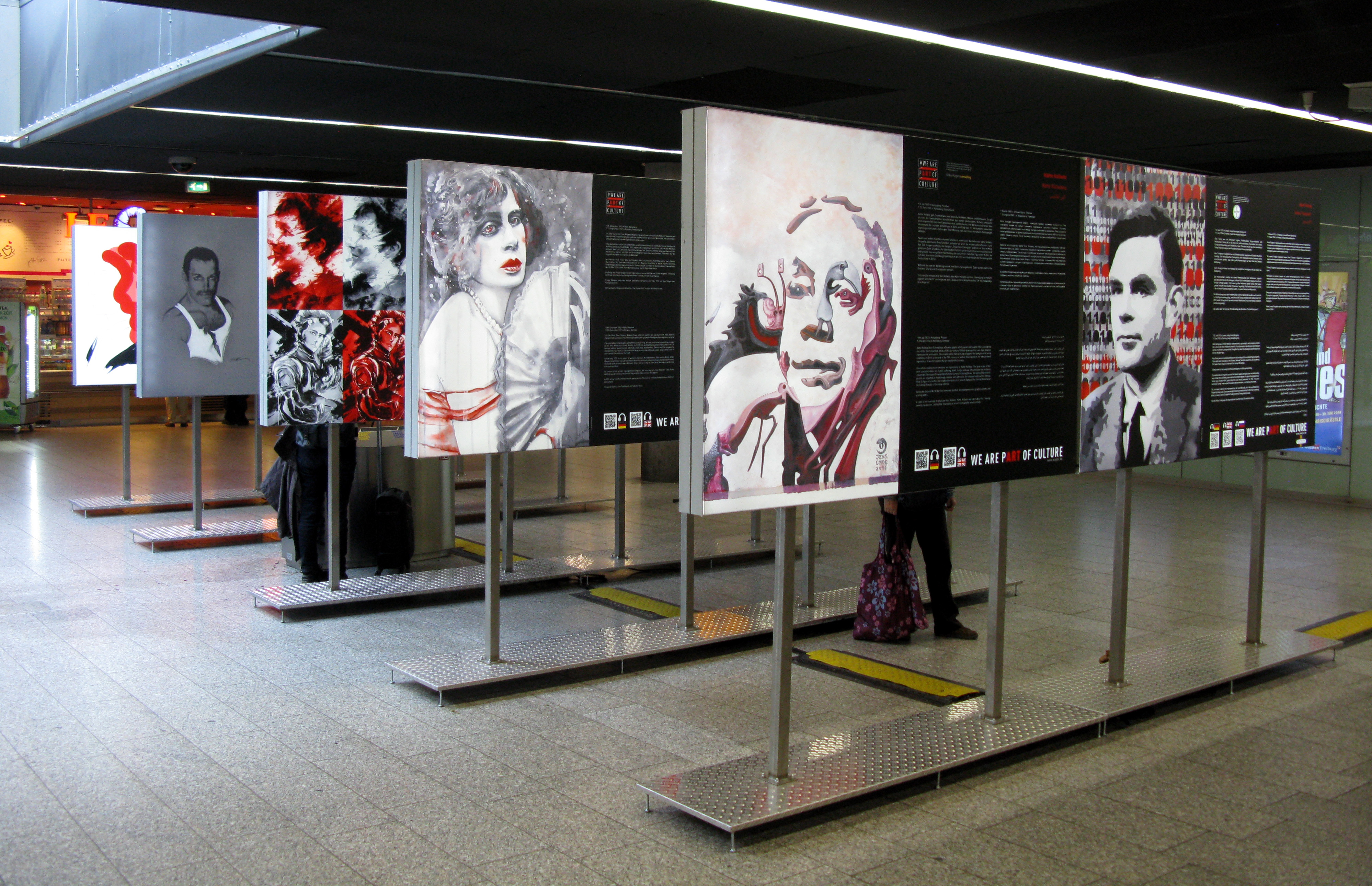 We are Part of Culture, Ausstellung von künstlerischen Porträts von LGBTTIQ*-Persönlichkeiten im Untergeschoss des Freiburger Hauptbahnhofs.